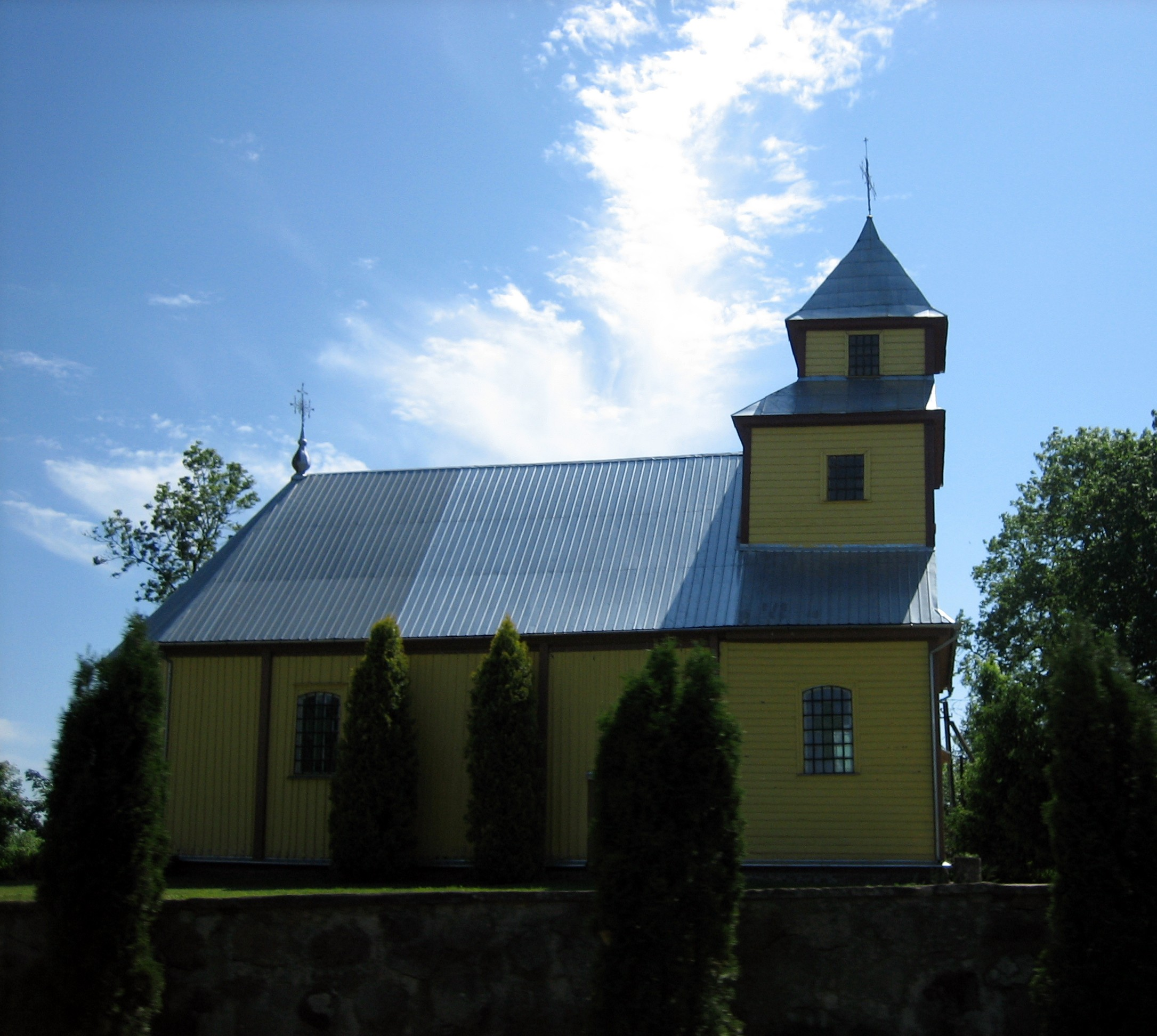 Požerio bažnyčia